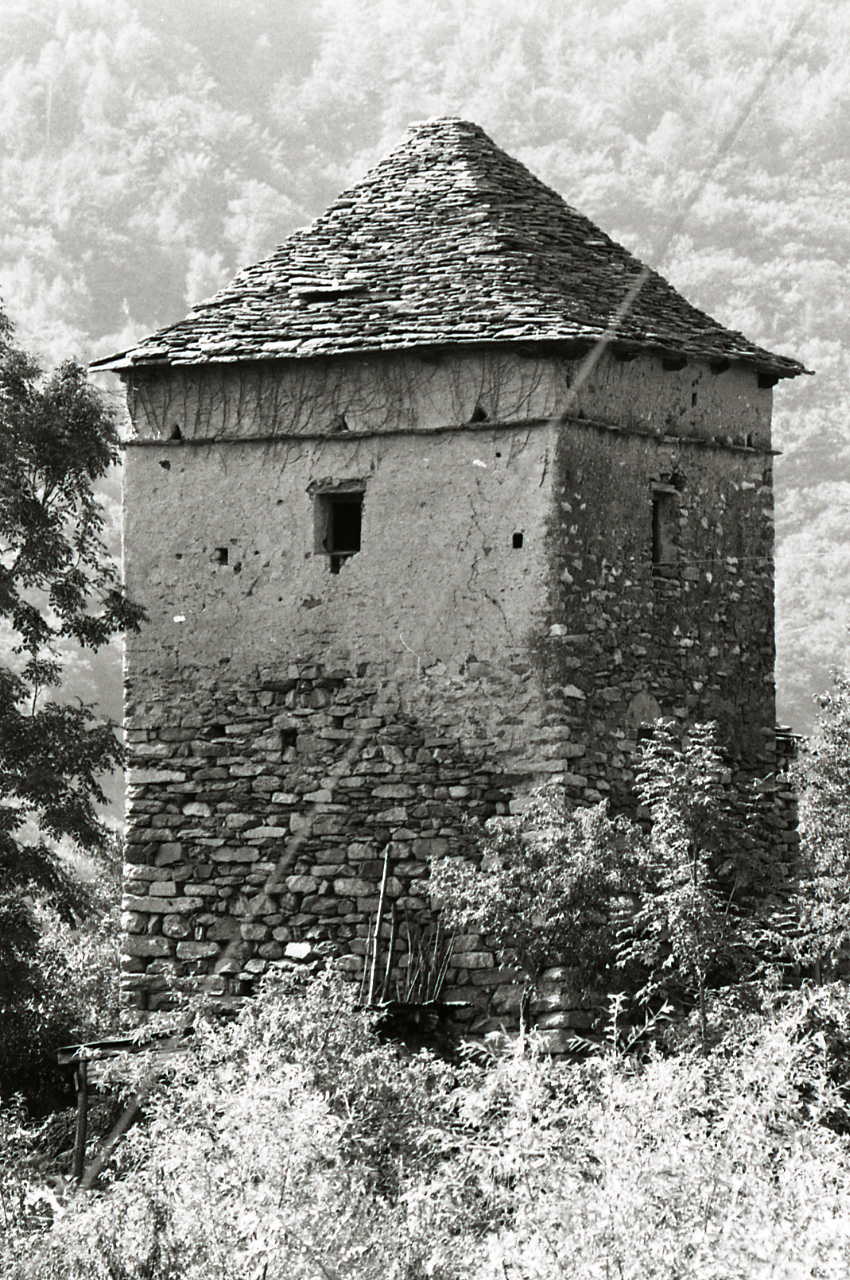 Servizio fotografico : Piedimulera, 1982 / Paolo Monti. - Strisce: 2, Fotogrammi complessivi: 8 : Negativo b/n, gelatina bromuro d'argento/ pellicola ; 35 mm. - ((Sul portanegativi: N[I]K[MA]T FP4 e iscrizione: "Cimamulera 31-38". - Confronta scheda 3853Lpbn31-38. - Occasione: Documentazione per la pubblicazione: Alberti Luigi, Rainaldi Giancesare, Rizzi Enrico (a cura di), "Elogio del Lago d'Orta", Anzola d'Ossola-Valstrona, Fondazione arch. Enrico Monti-Lo Strona, 1983. - Fonte: Agenda di Paolo Monti: Nikon Leika 3001-/ Monti 1978 (1978-1982), presso Archivio Paolo Monti